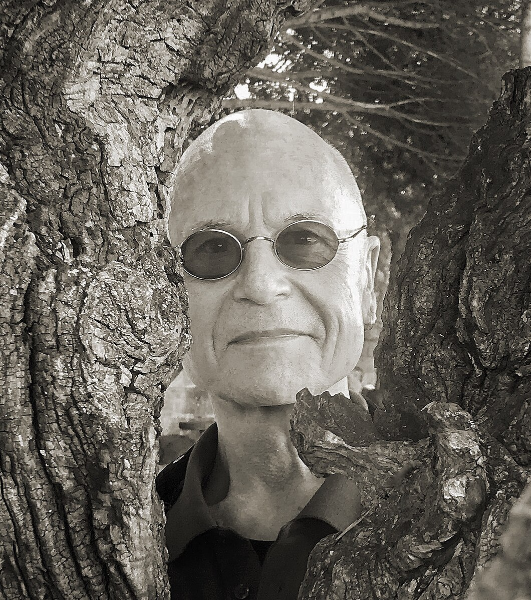 Götz Naleppa privat